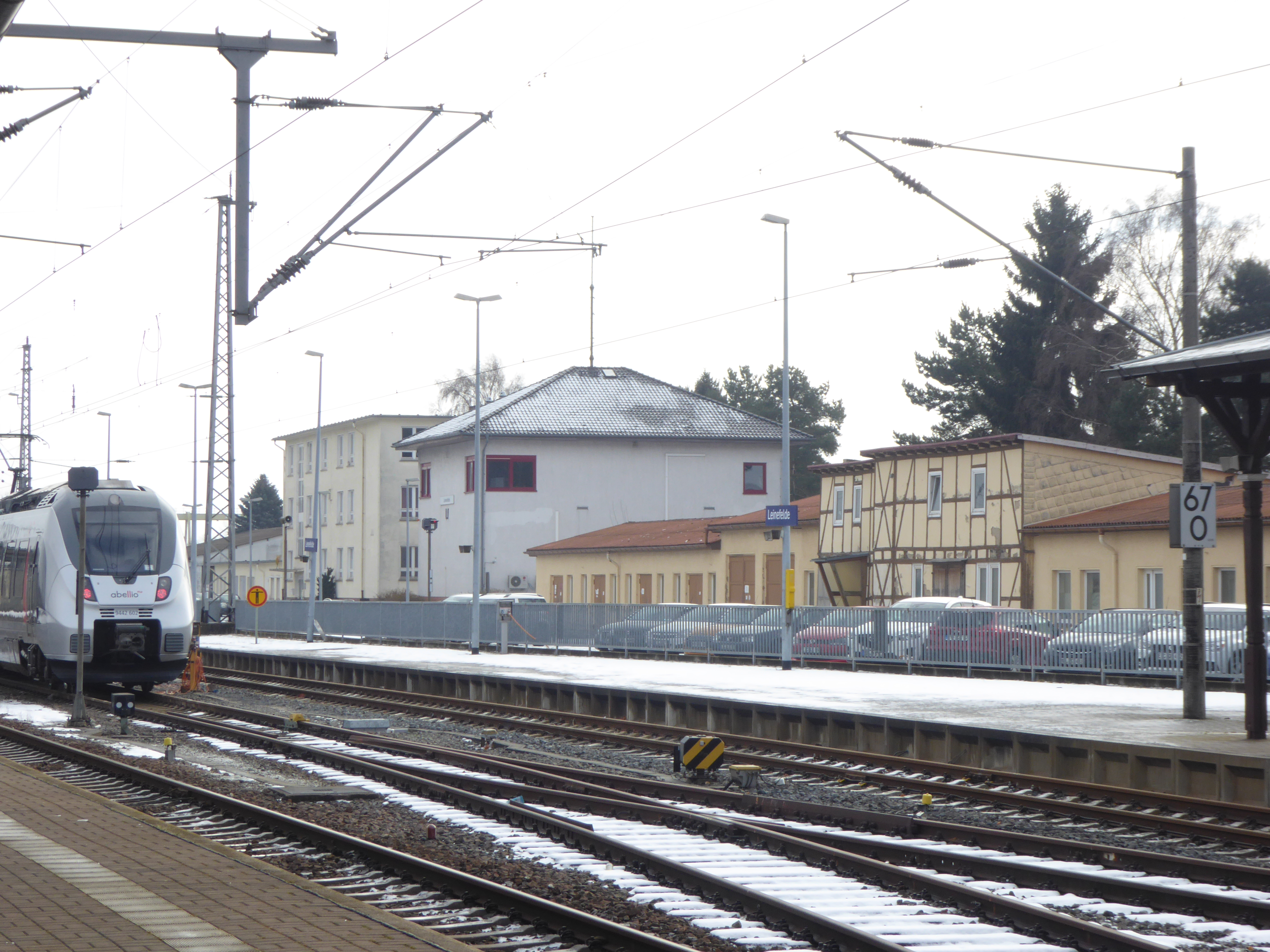 Blick vom Bahnsteig (Gleis 6) über die Kopfgleise zum Elektronischen Stellwerk in Leinefelde.